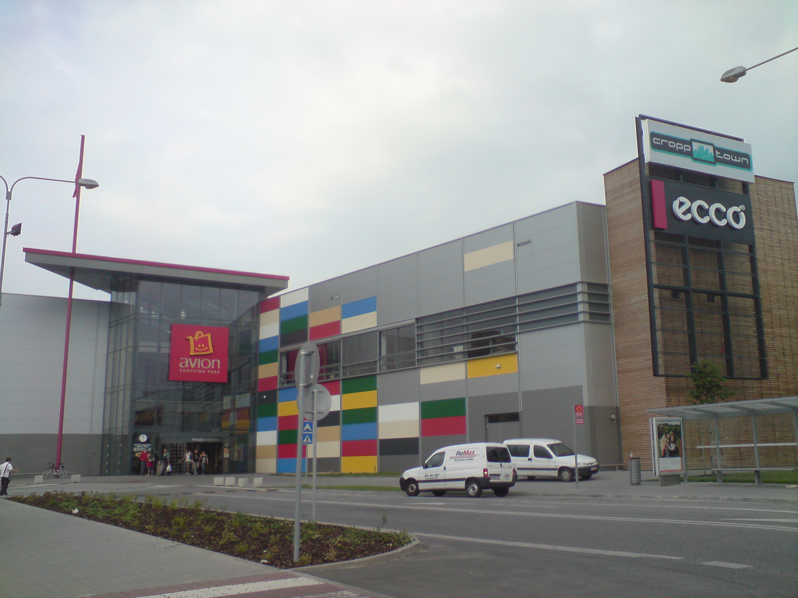 Avion Shopping Park